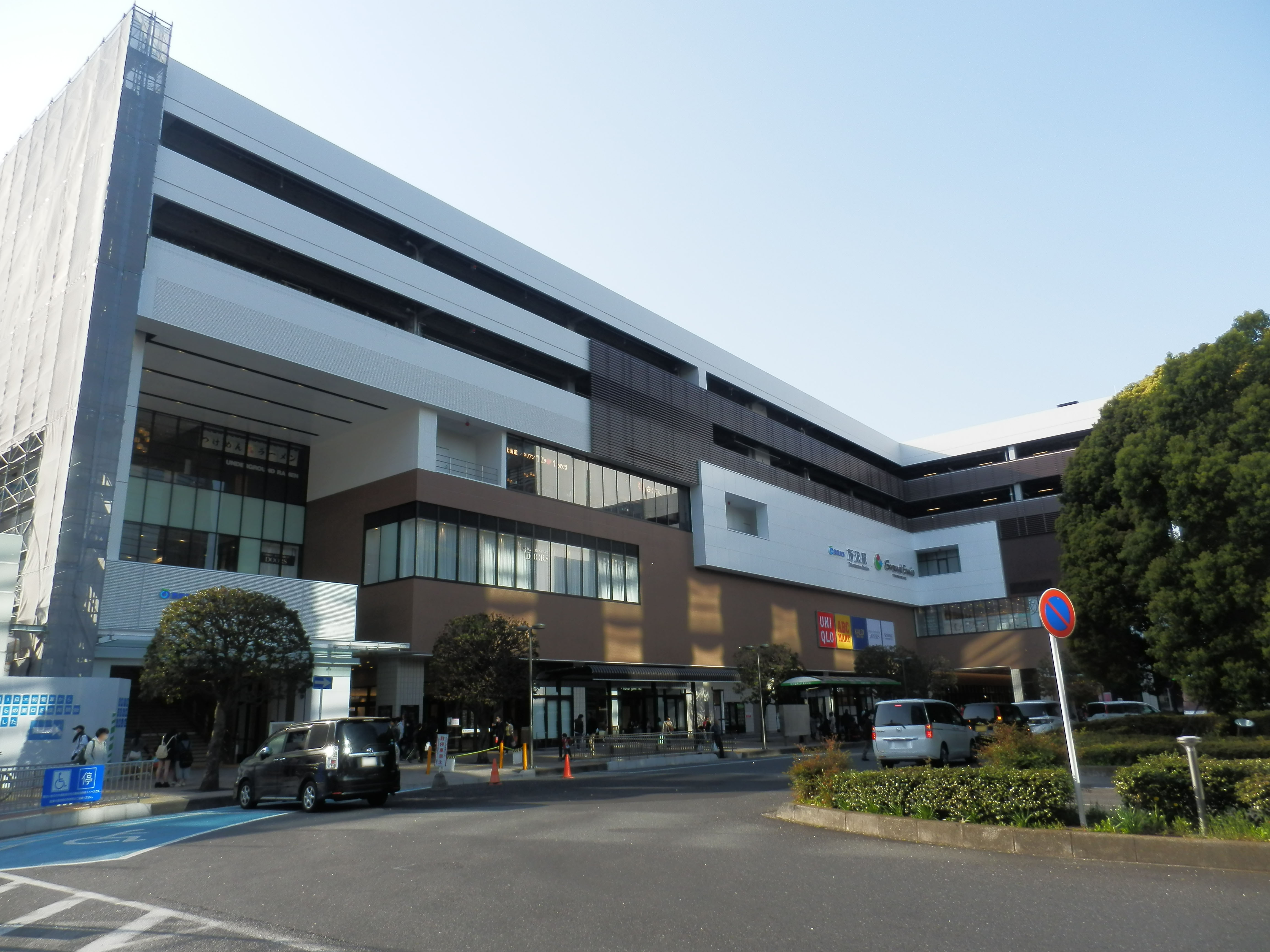 Grand Emio所沢（所沢駅東口）